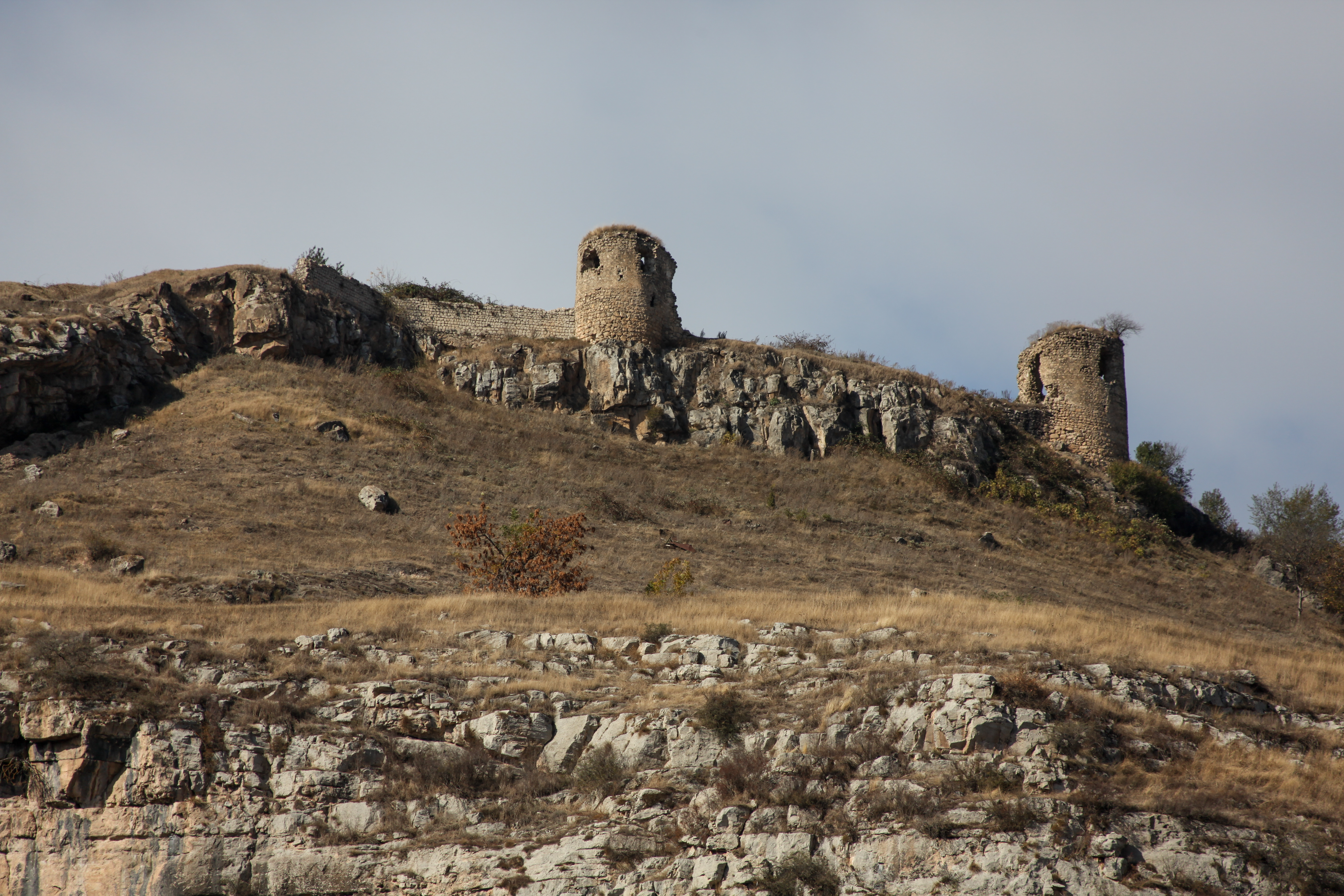 Շուշիի պարիսպներ